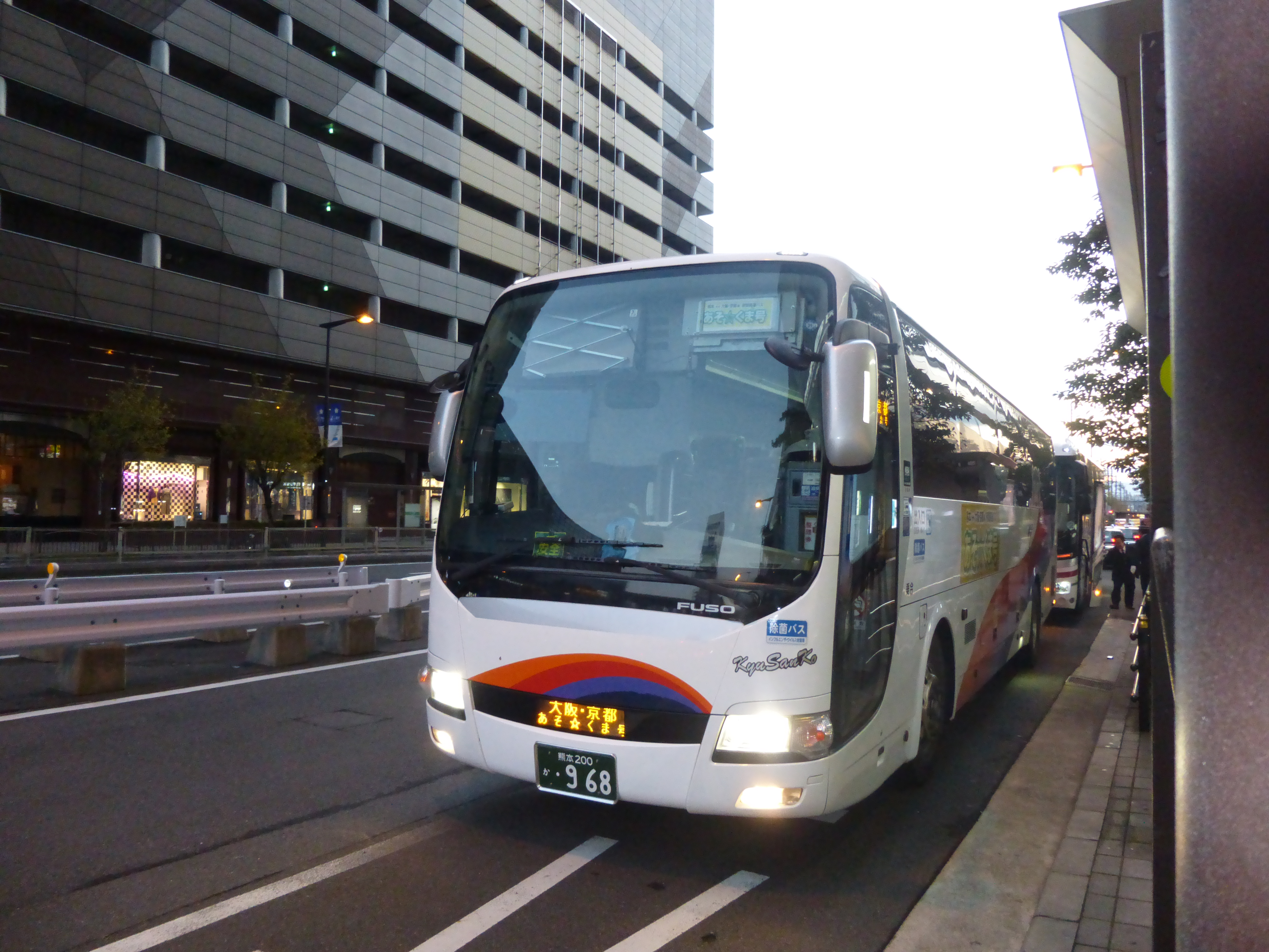 九州産交バス「あそ☆くま号」専用車、熊本200 か 968 車種：三菱ふそうエアロエース。大阪・阿倍野橋駅にて撮影